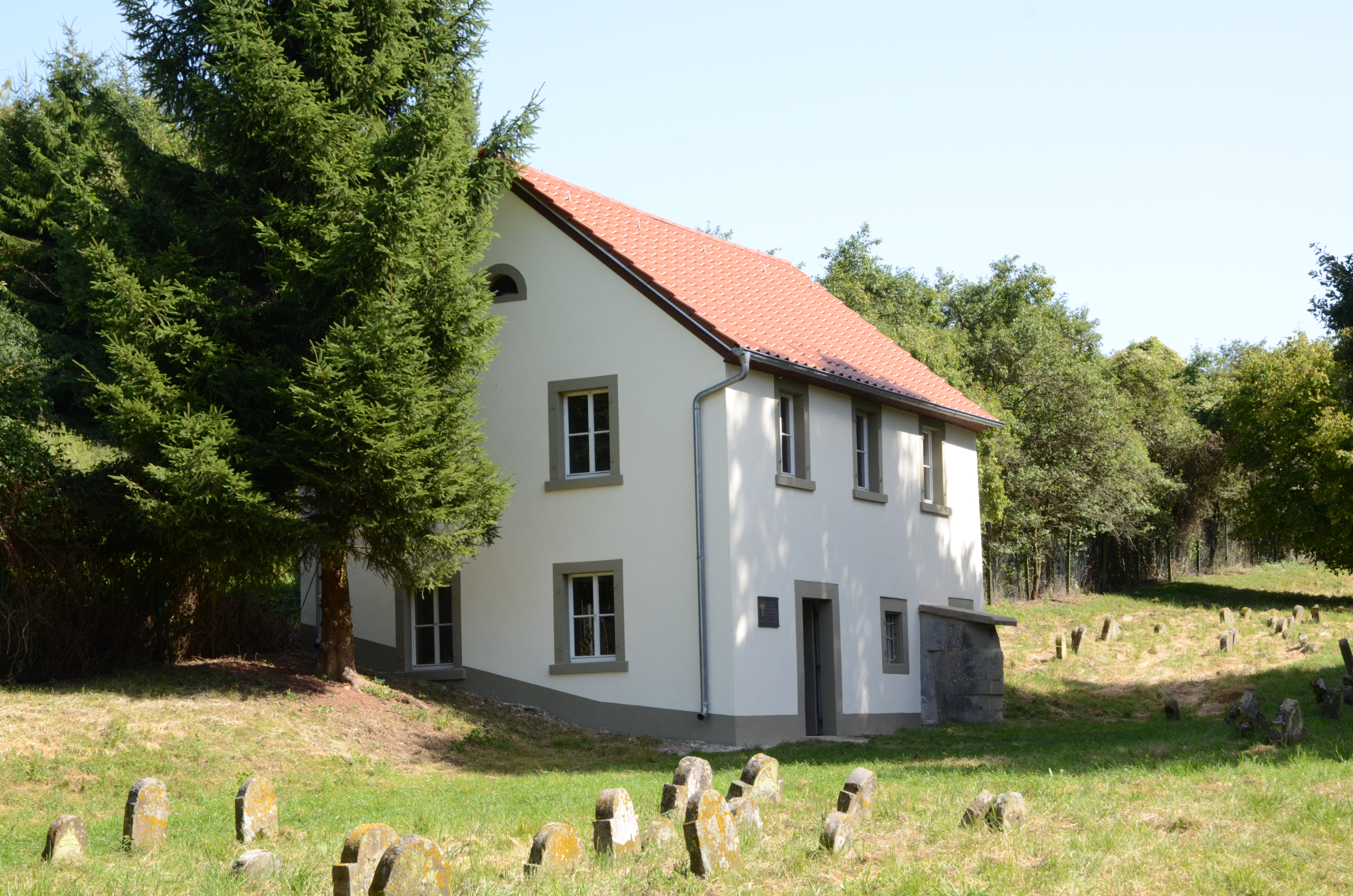 Taharahaus im Jüdischer Friedhof in Schwanfeld